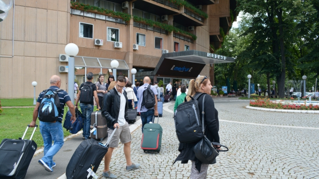 Dolazak gostiju u Merkur